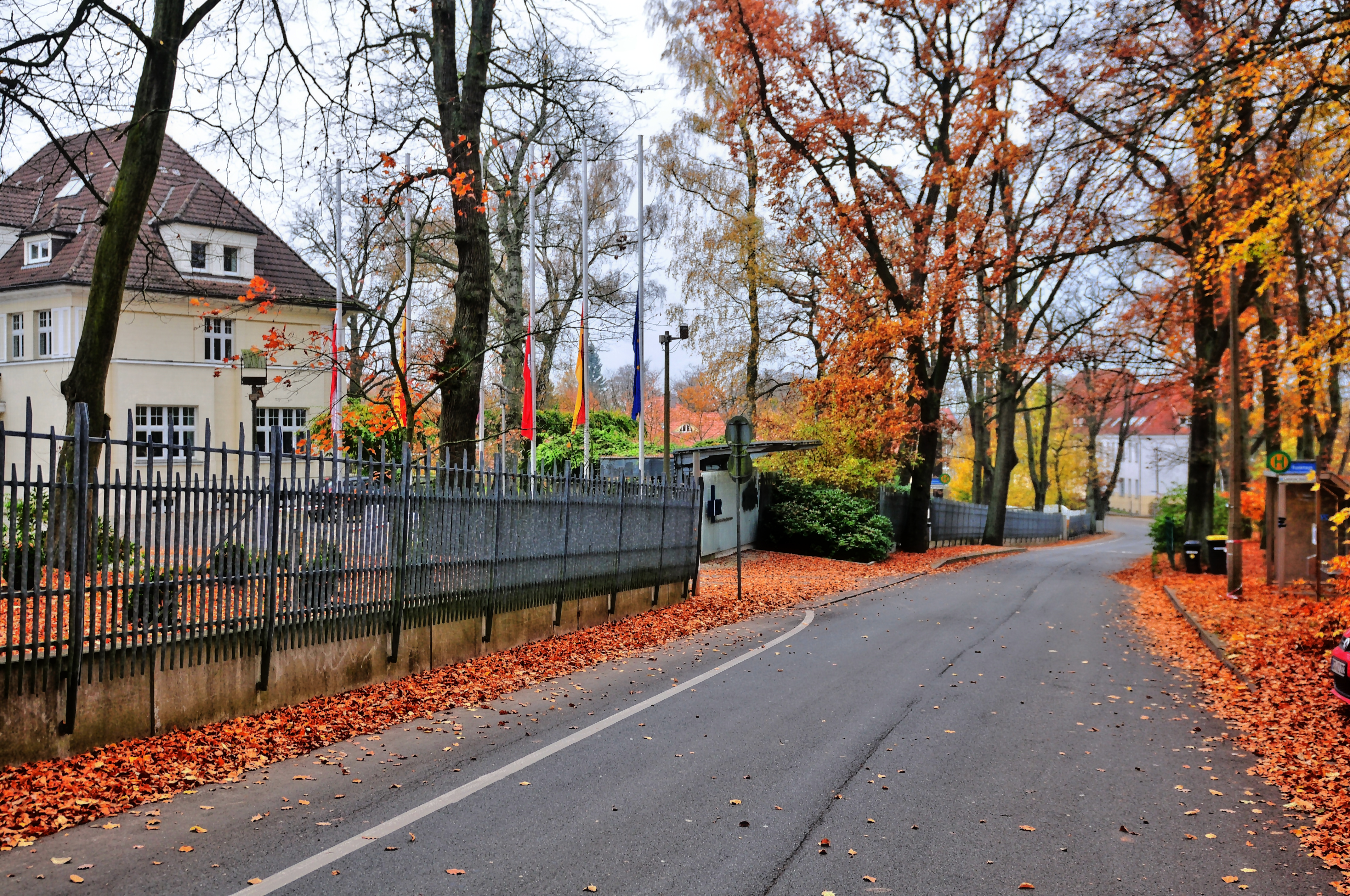 Schwerin